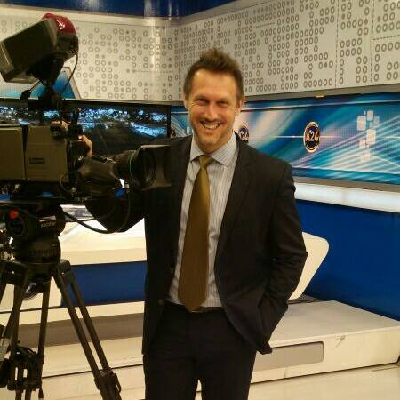 David Kavlin en los estudios de A24